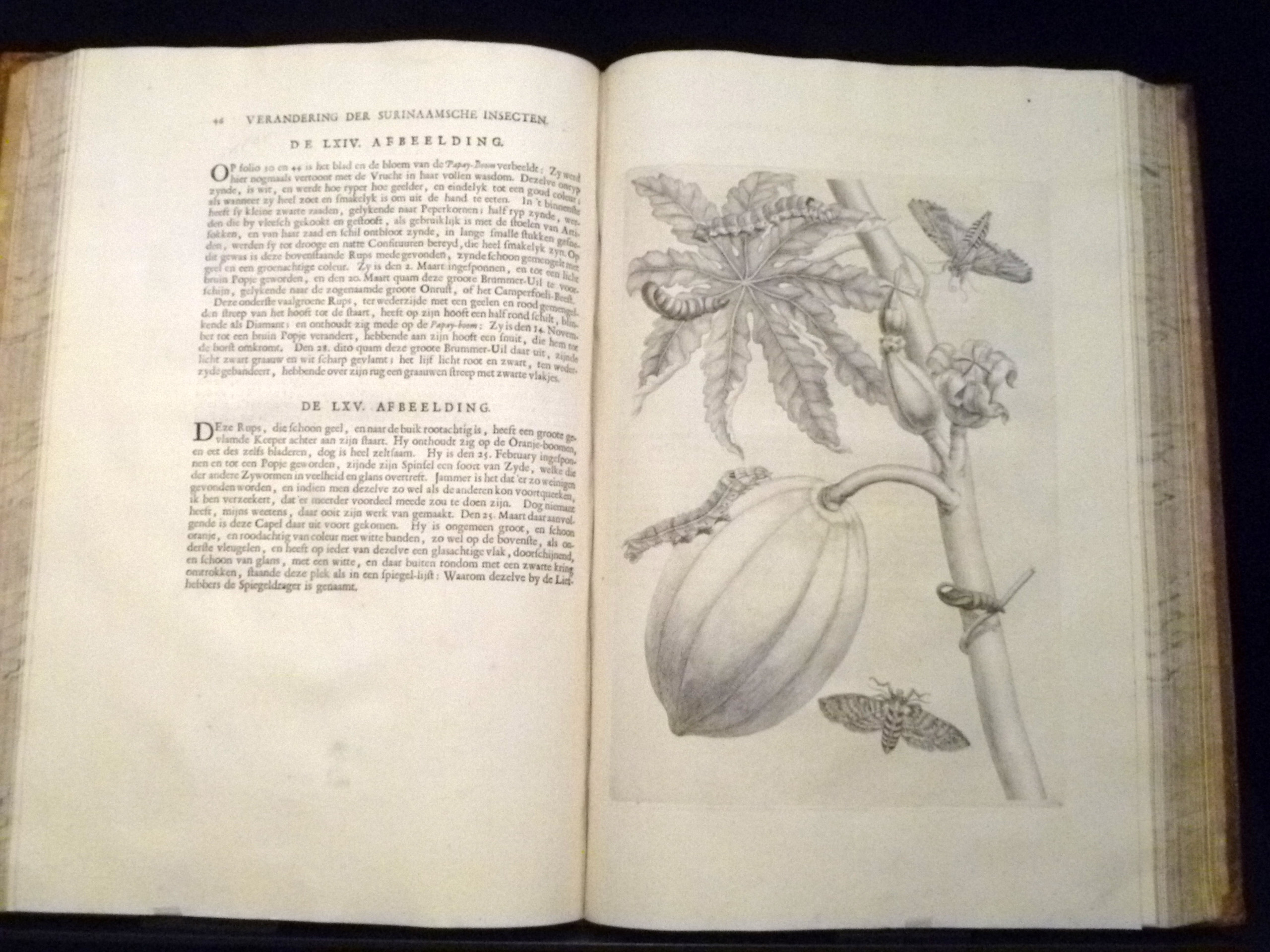 "Verandering der Surinaamsche Insecten" (Amsterdam, 1730) door Maria Sibylla Merian; Rijksmuseum, Amsterdam